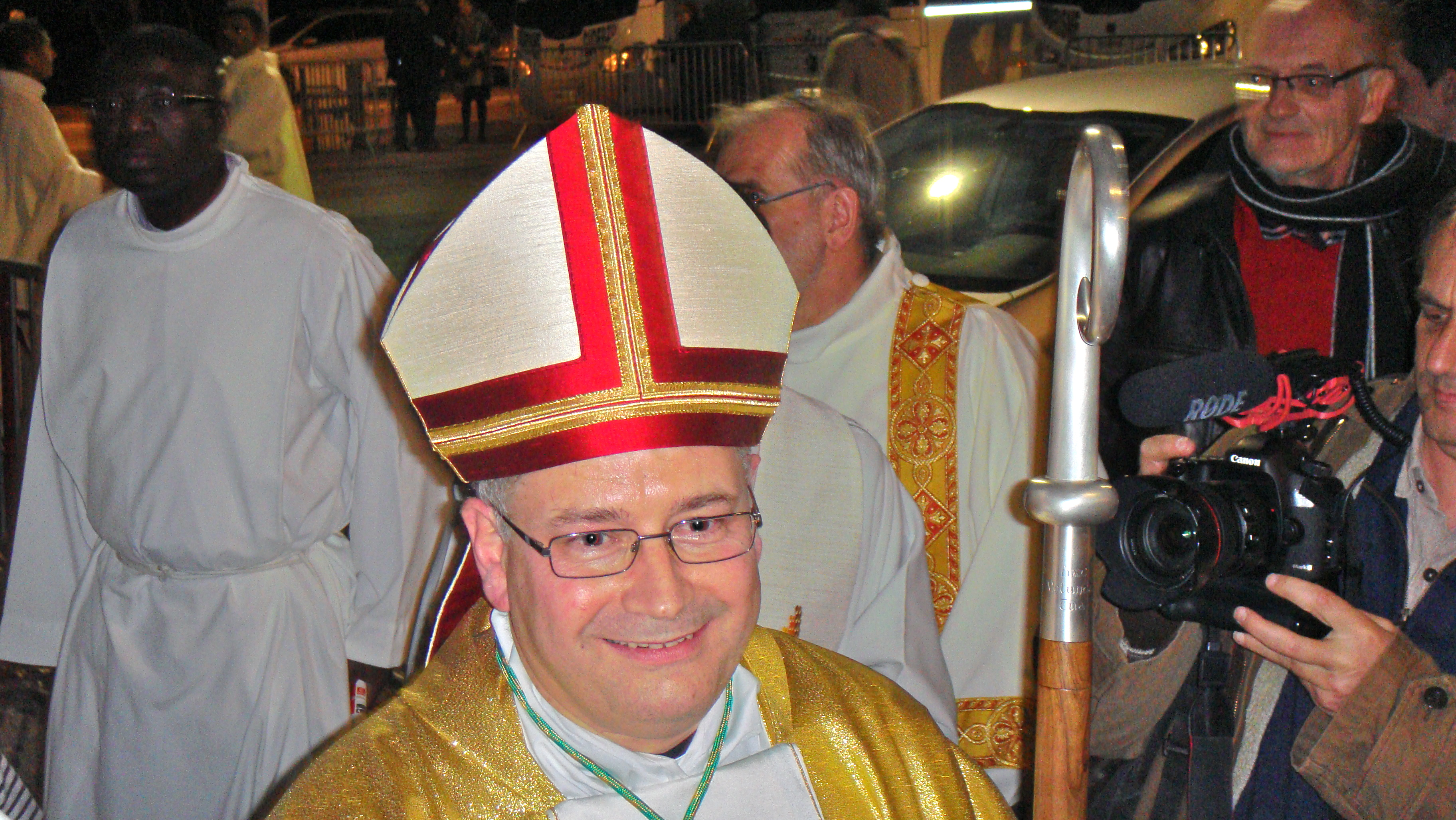 Eveque de Dignes les Bains